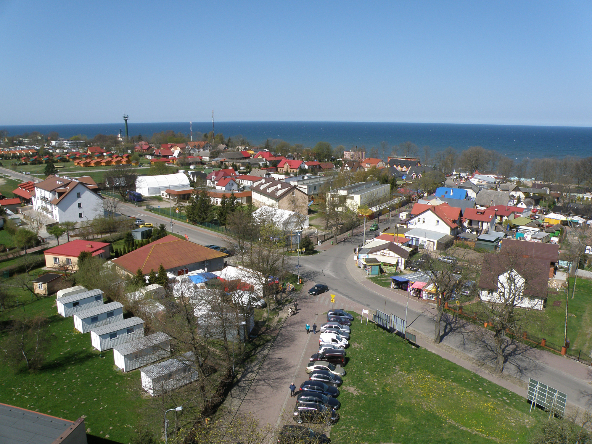 Jarosławiec - województwo zachodniopomorskie